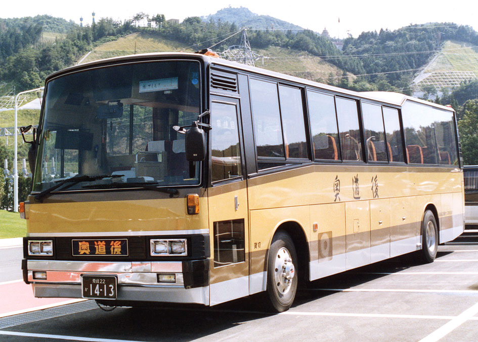 奥道後温泉観光バス P-MS725 新呉羽 サンシャイン